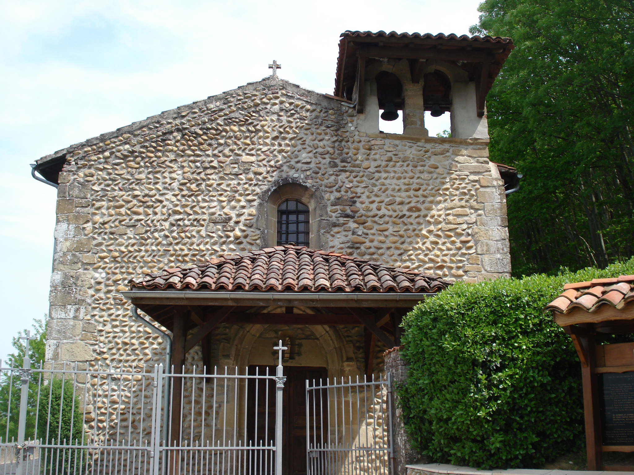 chapelle Notre Dame de Chatenay à Lens-Lestang dans la Drôme